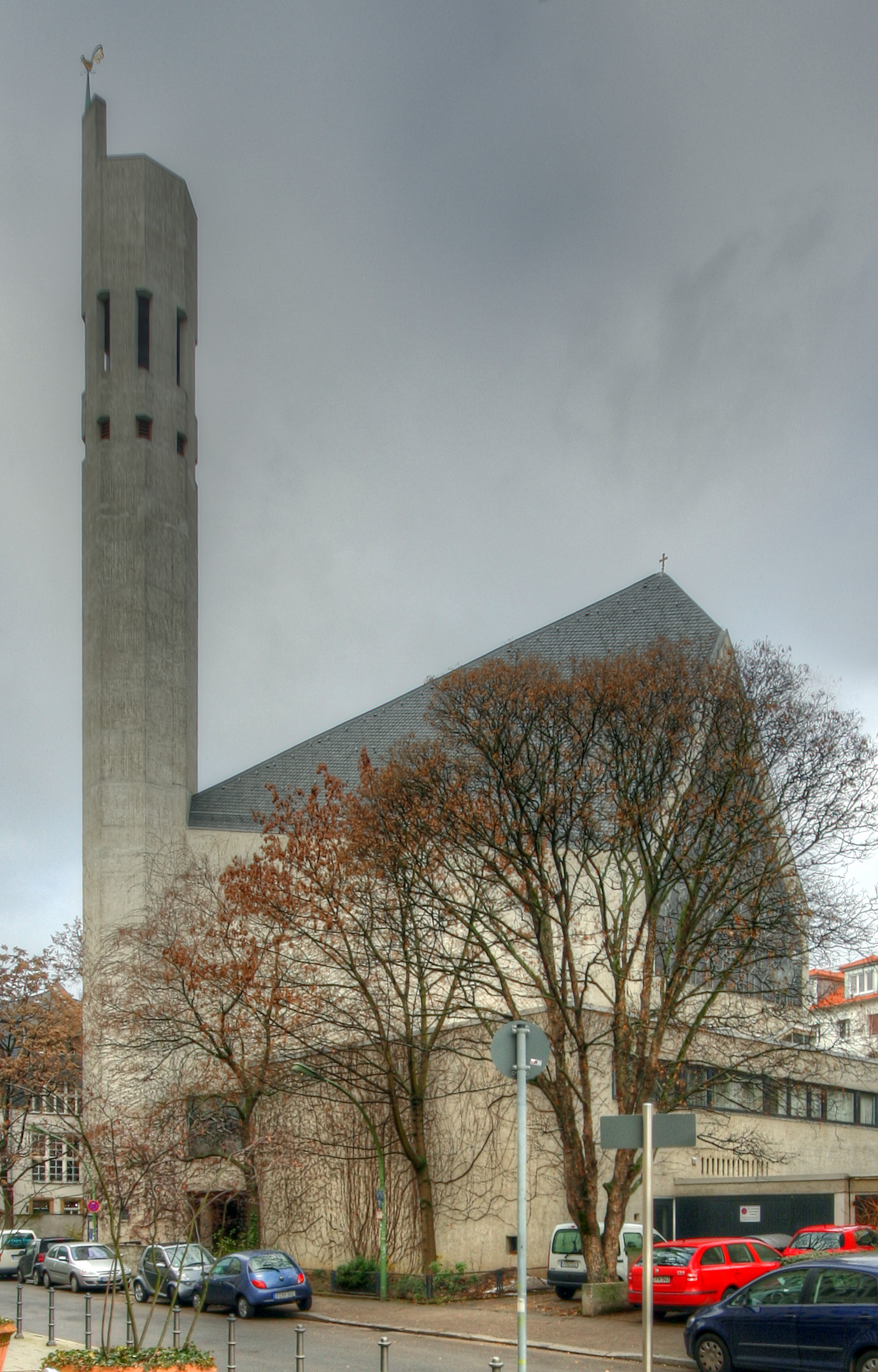 Ignatiuskirche, Gärtnerweg, Frankfurt am Main. Architekt: Gottfried Böhm, Projektzeit 1961-1965, Grundstein 1963, Eröffnung 1964